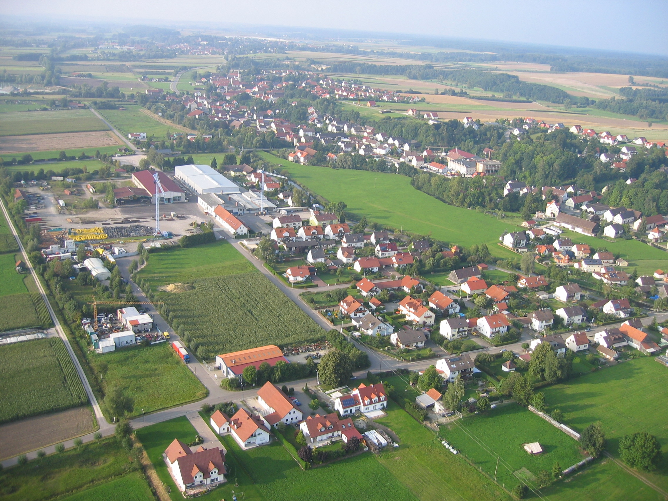 Luftbild Gerstlauer